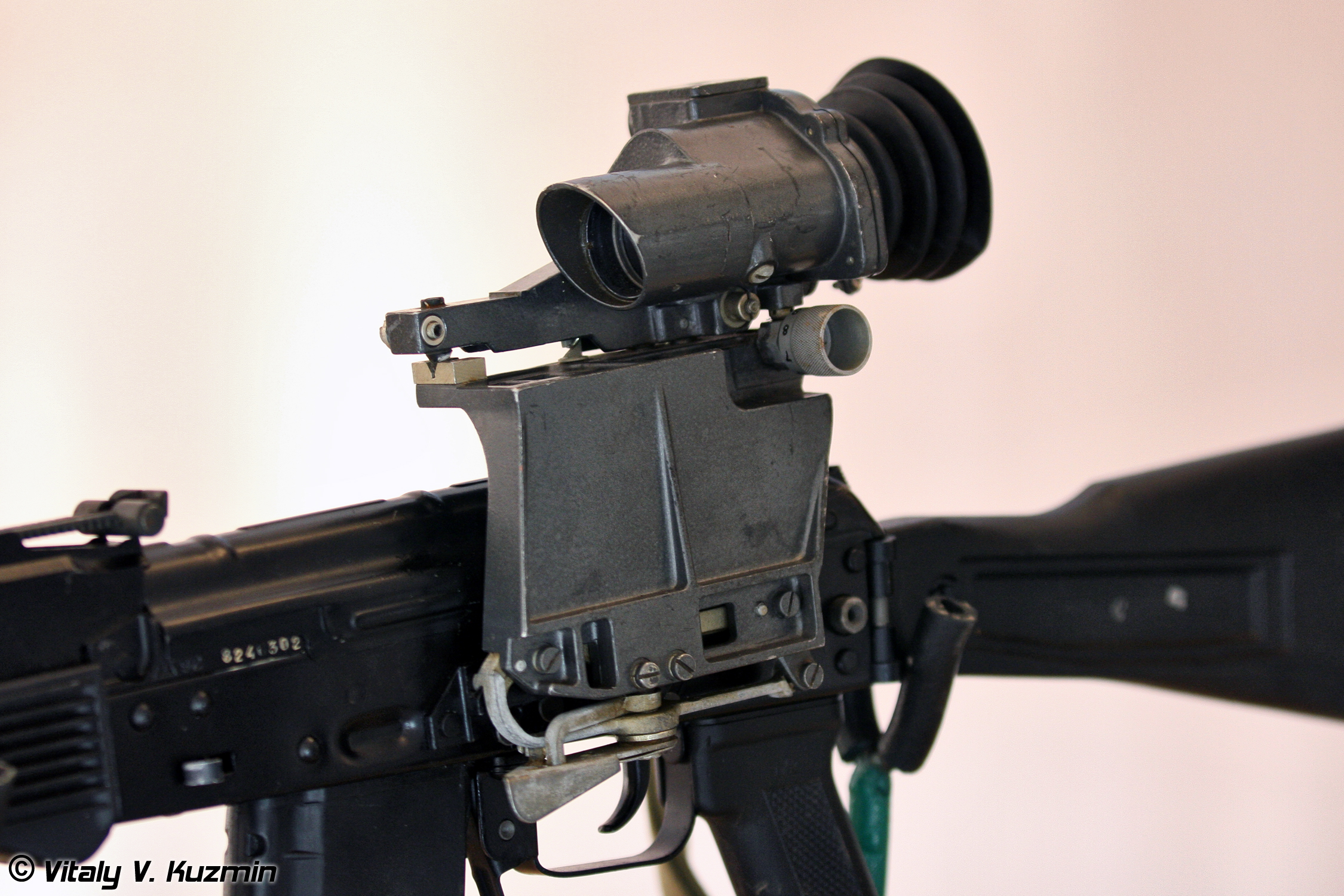 Унифицированный стрелковый прицел УСП-1 1П29 (Unified shooting sight USP-1 1P29)